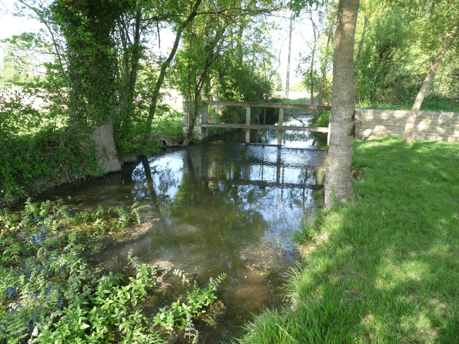 Le Sauvage près du lavoir de Bonneville au pied de Patreville, Charente, France